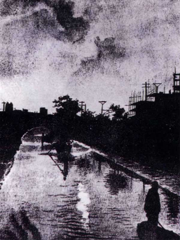 1927年摄于墙子河。